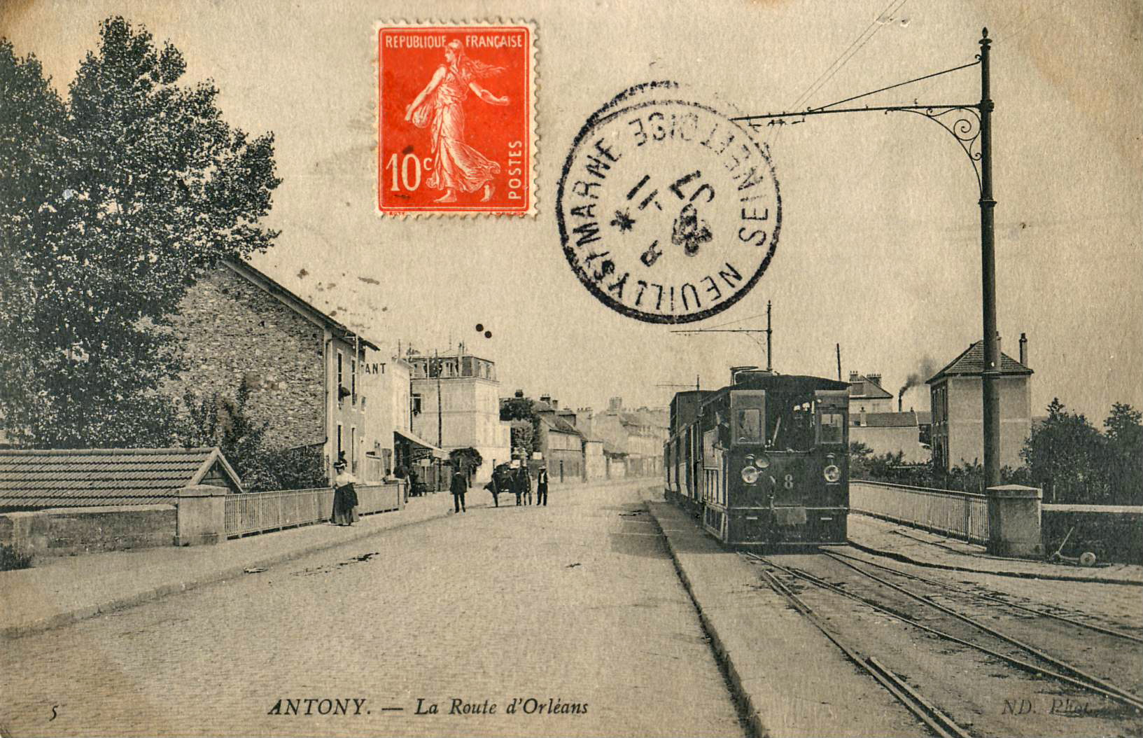 Carte postale ancienne éditée par ND, n°5 :ANTONY - La Route d'Orléans